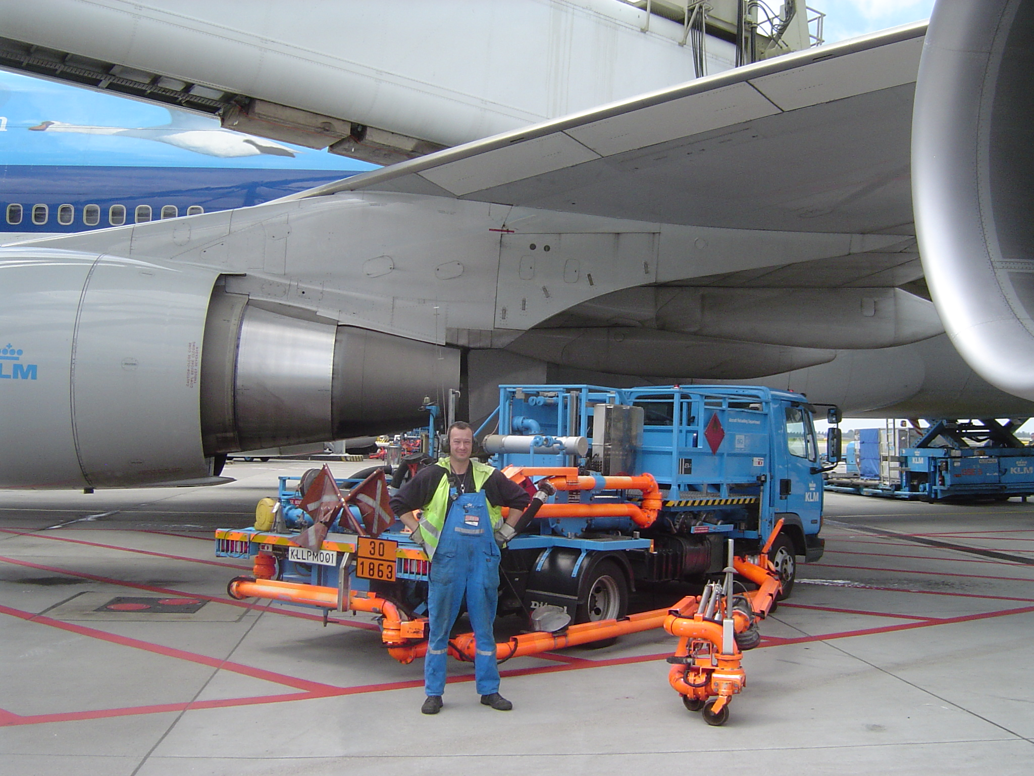 een voertuig om brandstof te tanken naast een Boeing 747-400, luchthaven Schiphol